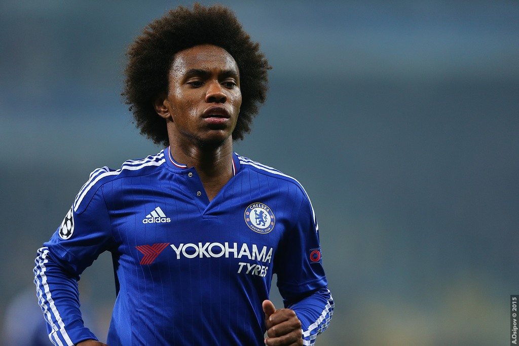 20.10.2015 Kyiv, Olimpiyskiy National Sports Complex Champions League. Group stage. FC Dynamo Kyiv - Chelsea - 0:0 Chelsea (4-2-3-1): Begovic; Zouma, Cahill, JT (c), Azpilicueta; Ramires, Matic; Willian, Fabregas (Oscar 75), Hazard; Diego Costa. Unused subs Blackman, Baba, Mikel, Traore, Kenedy, Falcao. Booked Zouma 67 Dynamo Kiev (4-1-4-1): Shovkovskiy; Danilo Silva, Khacheridi, Dragovic, Vida; Rybalka; Yarmolenko, Sydorchuk, Buyalskiy (Garmesh 83), Gonzalez; Kravets (Junior Moraes 78). Unused subs Rybka, Antunes, Petrovic, Gusev, Miguel Veloso. Booked Buyalskiy 65 20.10.2015 г.Киев. НСК "Олимпийский". Лига Чемпионов. Групповой этап Динамо — Челси 0:0 Динамо: Шовковский — Данило Силва, Драгович, Хачериди, Вида — Рыбалка, Буяльский (Гармаш, 83) — Ярмоленко, Сидорчук, Гонсалес — Кравец (Мораес, 78) Челси: Бегович — Аспиликуэта, Терри, Кэхилл, Зума — Матич, Рамирес — Виллиан, Фабрегас (Оскар, 75), Азар — Д. Коста Предупреждения: Буяльский — Зума